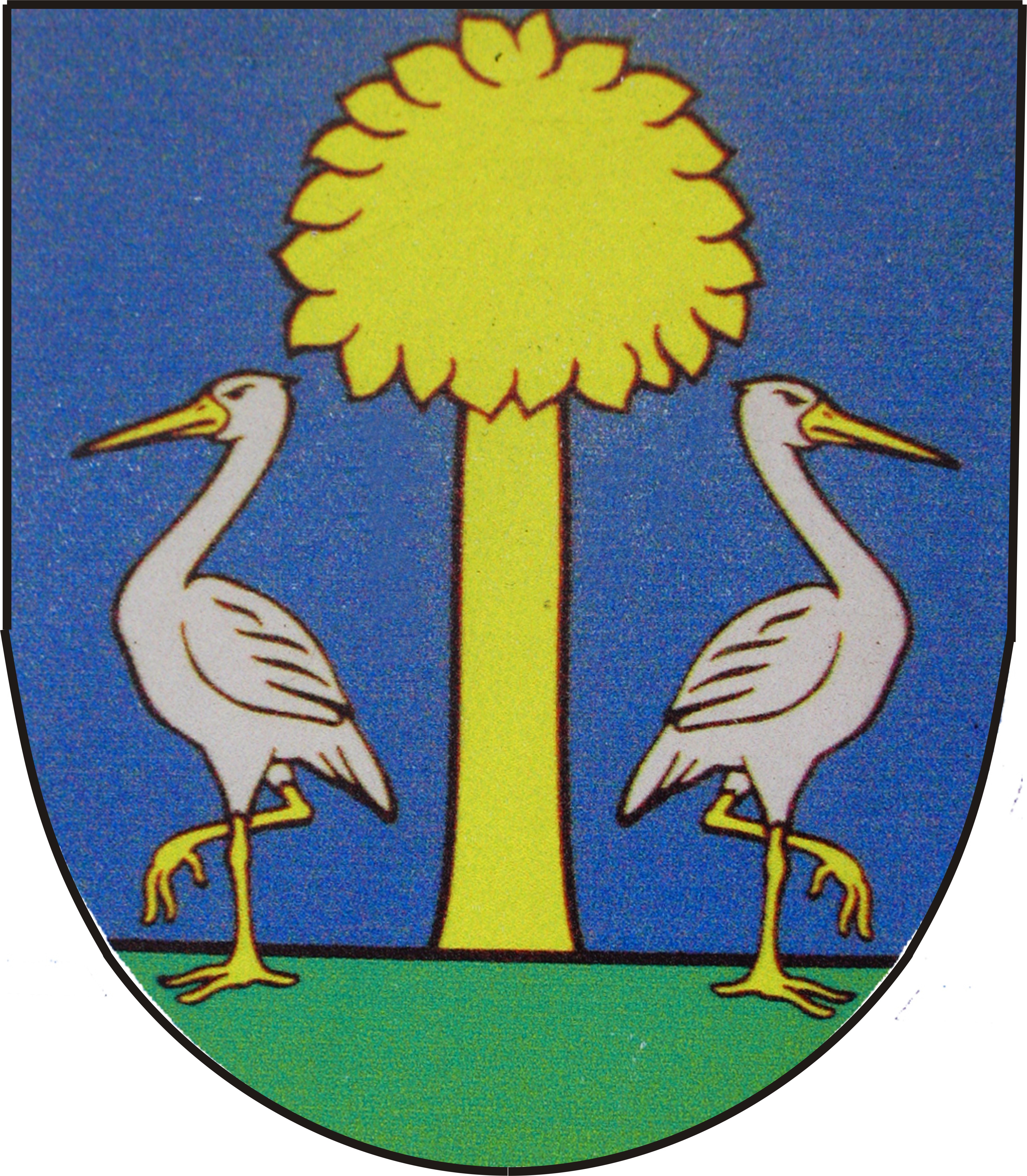 Erb obce Miroľa (HR: ?): V modrom štíte na zelenej pažiti medzi dvomi striebornými odvrátenými bocianmi v zlatej zbroji (so zlatým zobákom a zlatými nohami) vyrastá buk s hrubým kmeňom a malou korunou, všetko zlaté.